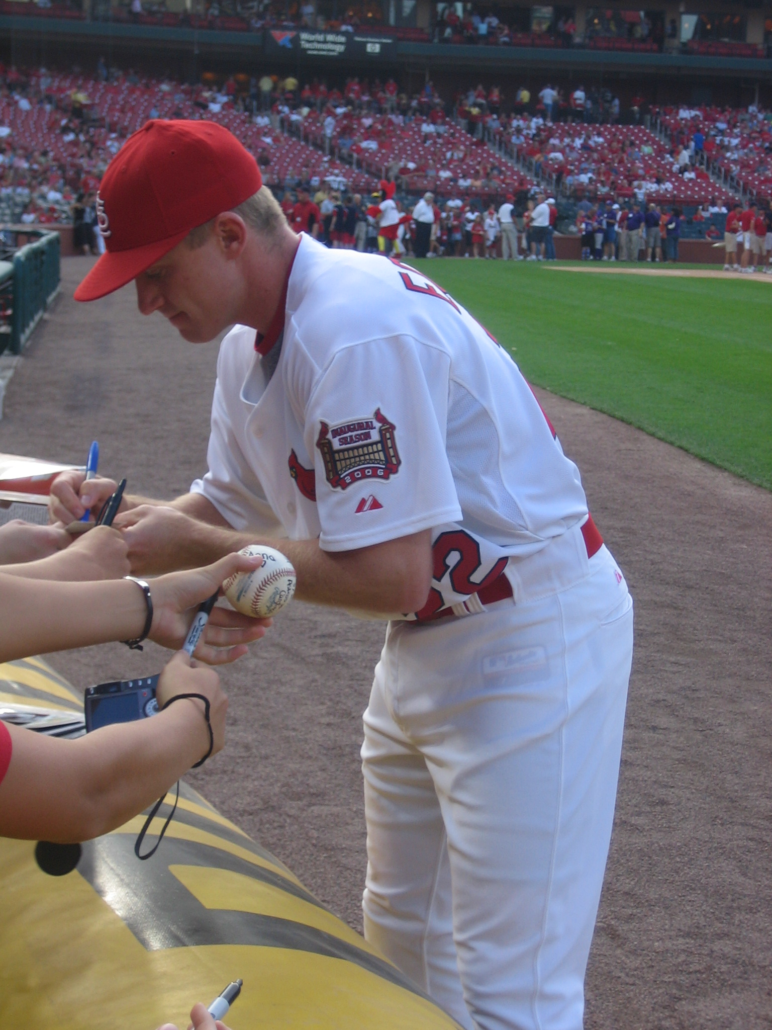 David Eckstein 01:07, 7 June 2007 . . Lindell005 . . 1,536×2,048 (750 KB)